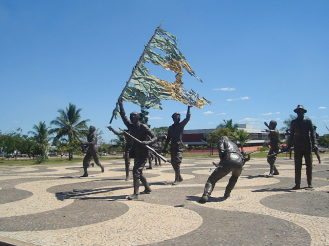 Coluna Prestes